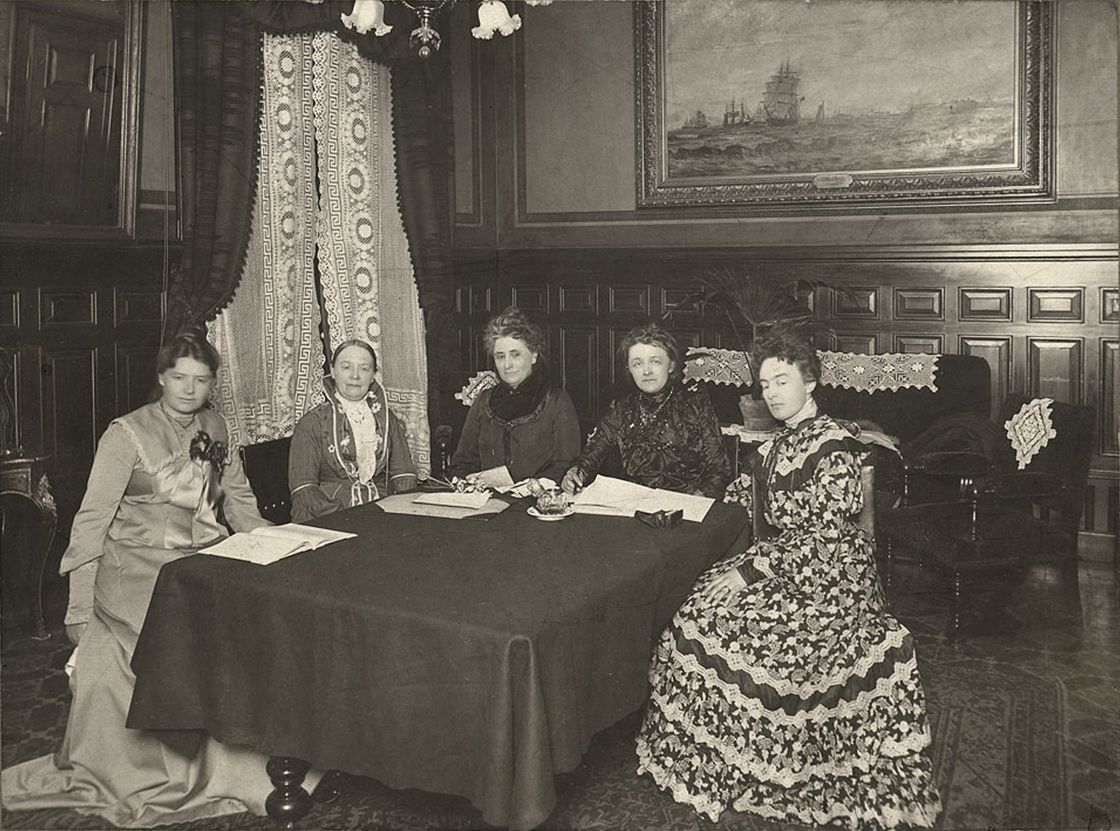 Norske kvinners nasjonalråd ble stiftet i 1904. Bildet er fra foreningens første styremøte. F.v. Karen Gude Koht, Fredrikke Marie Qvuam, Gina Krog, Betzy Kjeldsberg, Katti Anker Møller.